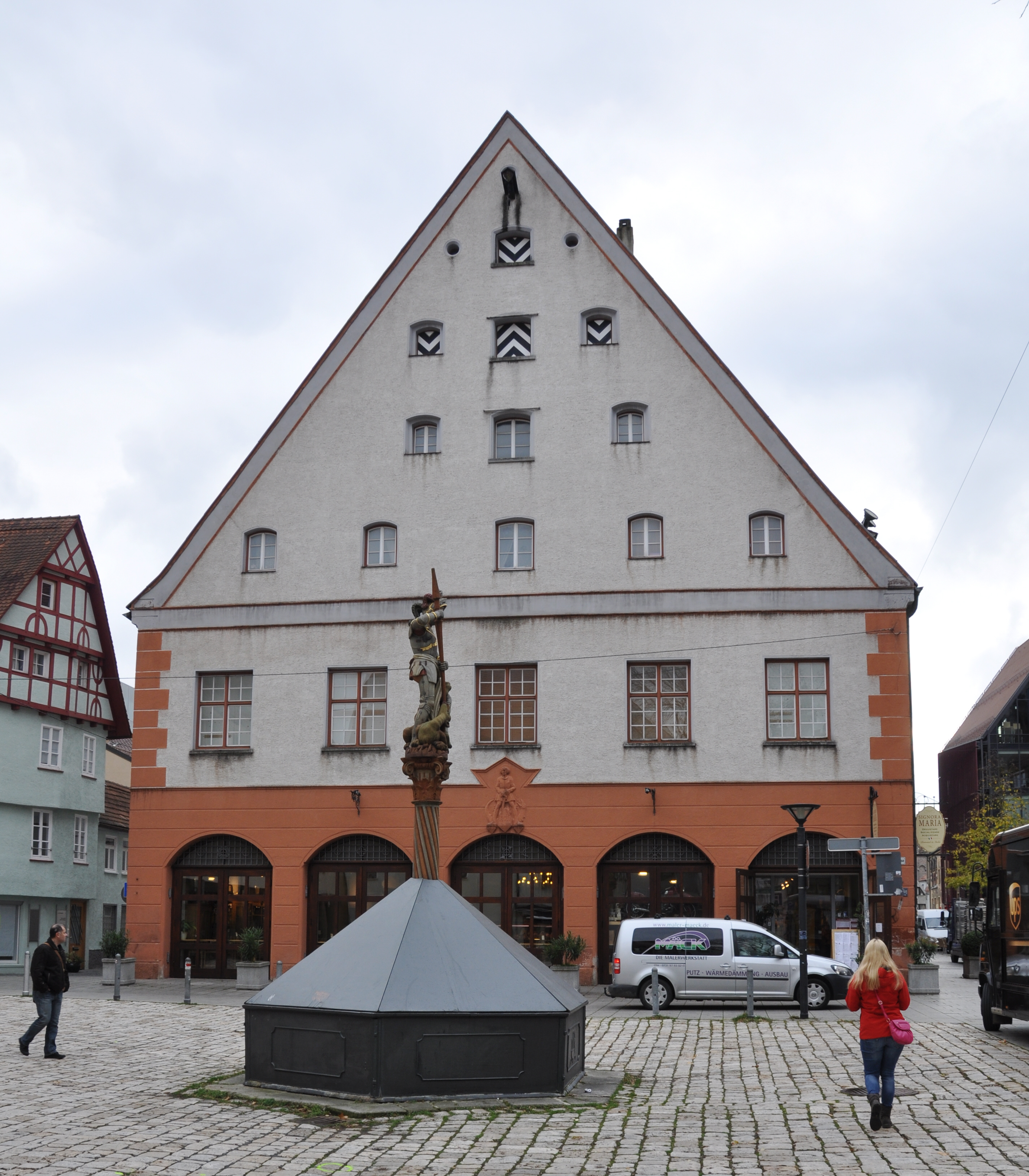 Ulm, „Schuhhaus“, Kramgasse 4 , Nordfassade